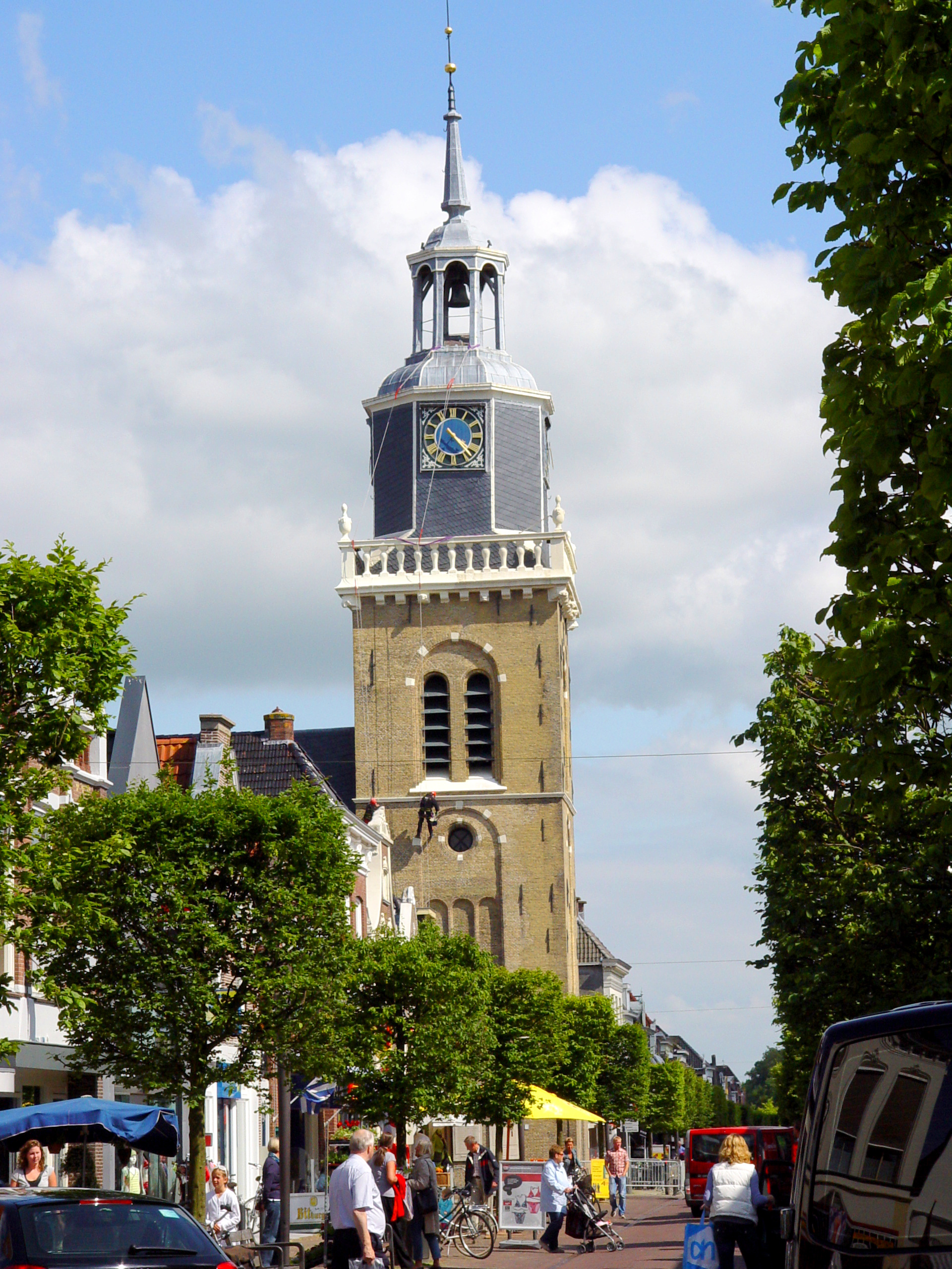 Joure - Hobbe van Baerdt Tsjerke - 2009